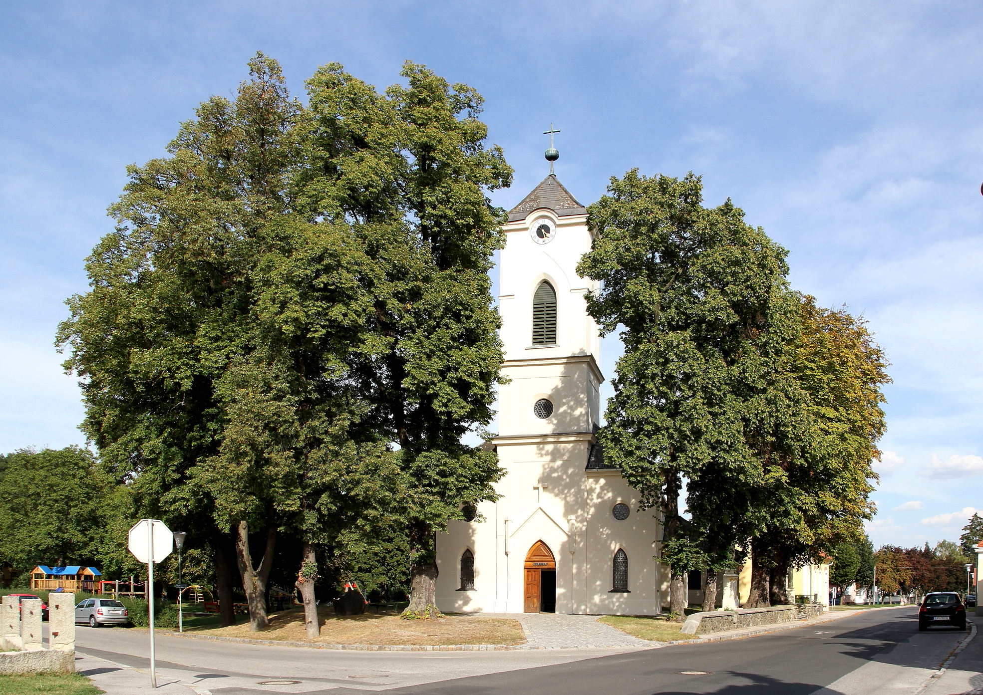 Die katholische Pfarrkirche hll. Simon und Judas Thaddäus in Mitterpullendorf, ein Ortsteil der burgenländischen Bezirkshauptstadt Oberpullendorf.